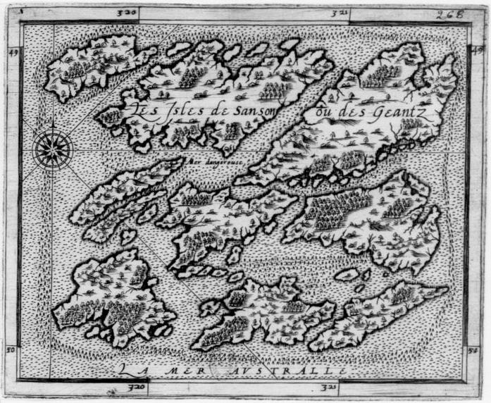 Mapa manuscrito en francés de 1586 de dos islas que han sido identificadas con las Malvinas. Rolando Laguarda Trías consideró que este mapa es una copia de otro realizado hacia 1520 por el piloto y cosmógrafo español Andrés de San Martín. Fuente: Sergio Esteban Caviglia, Malvinas : Soberanía, Memoria y Justicia : 10 de Junio de 1829, Ministerio de Educación de la Provincia de Chubut, 2012, pp.52-53.